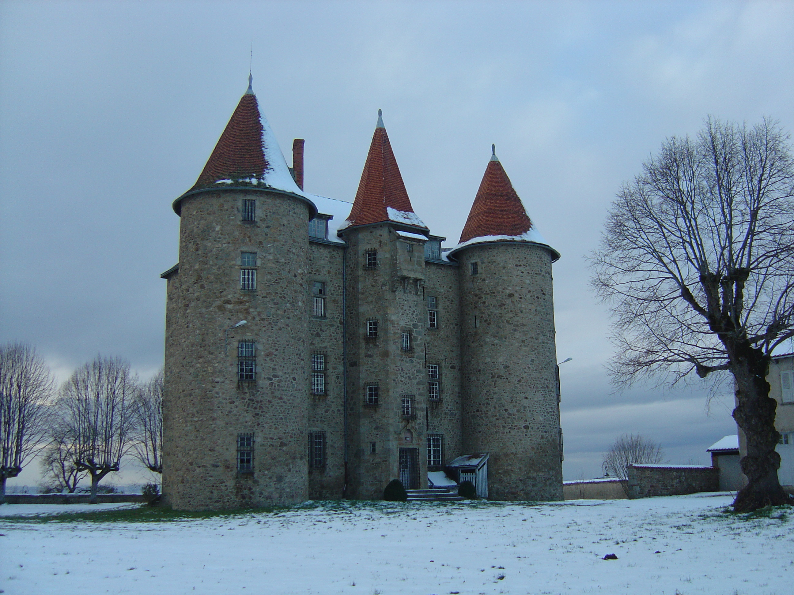 A l'intèrieur de la cour du château de Vernet-la-Varenne (Auvergne, 63, Livradois)